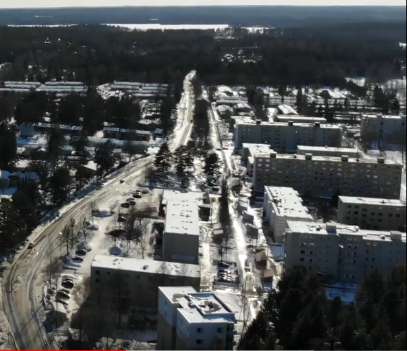 Nummea ilmasta.